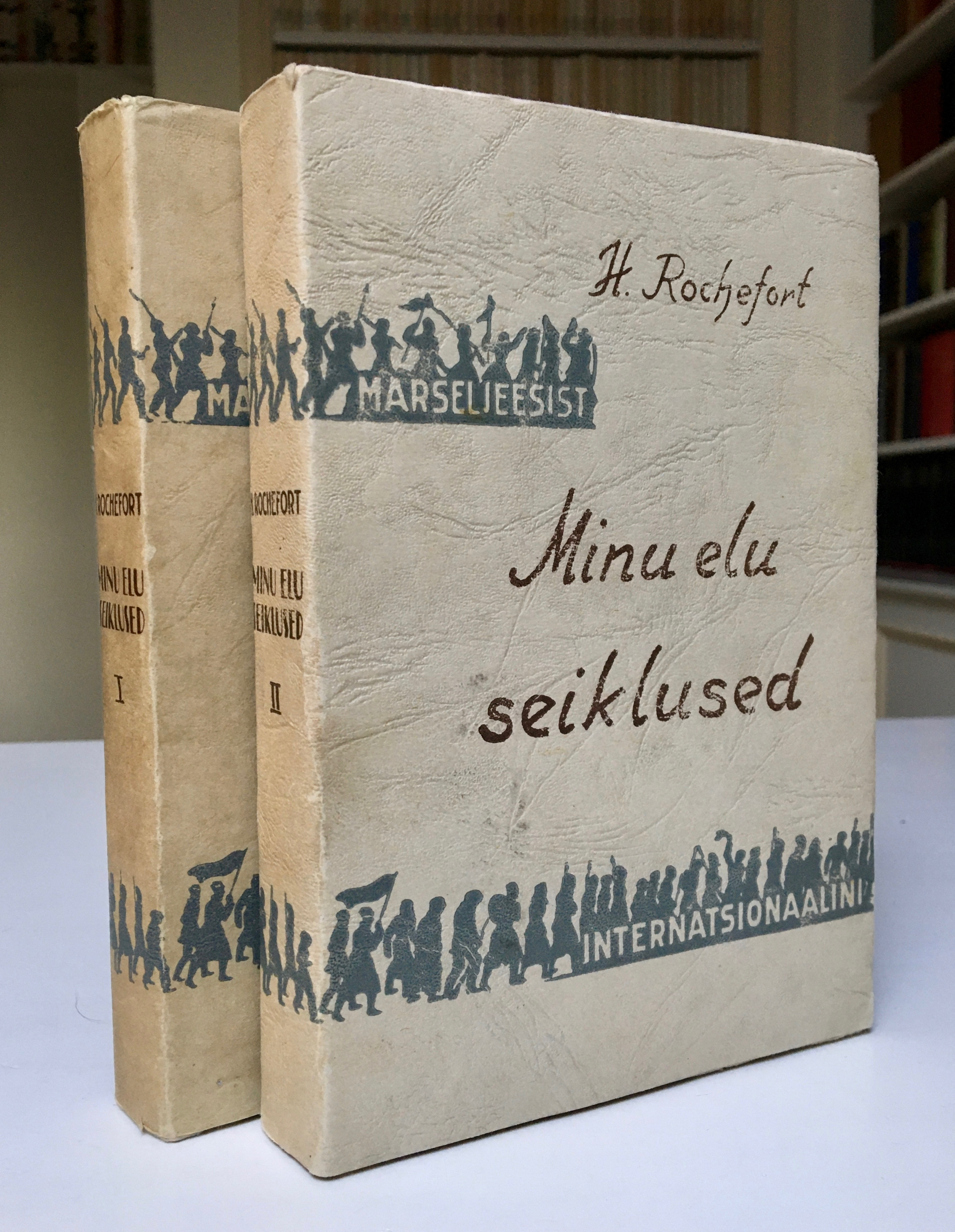 Marseljeesist internatsionaalini raamatud